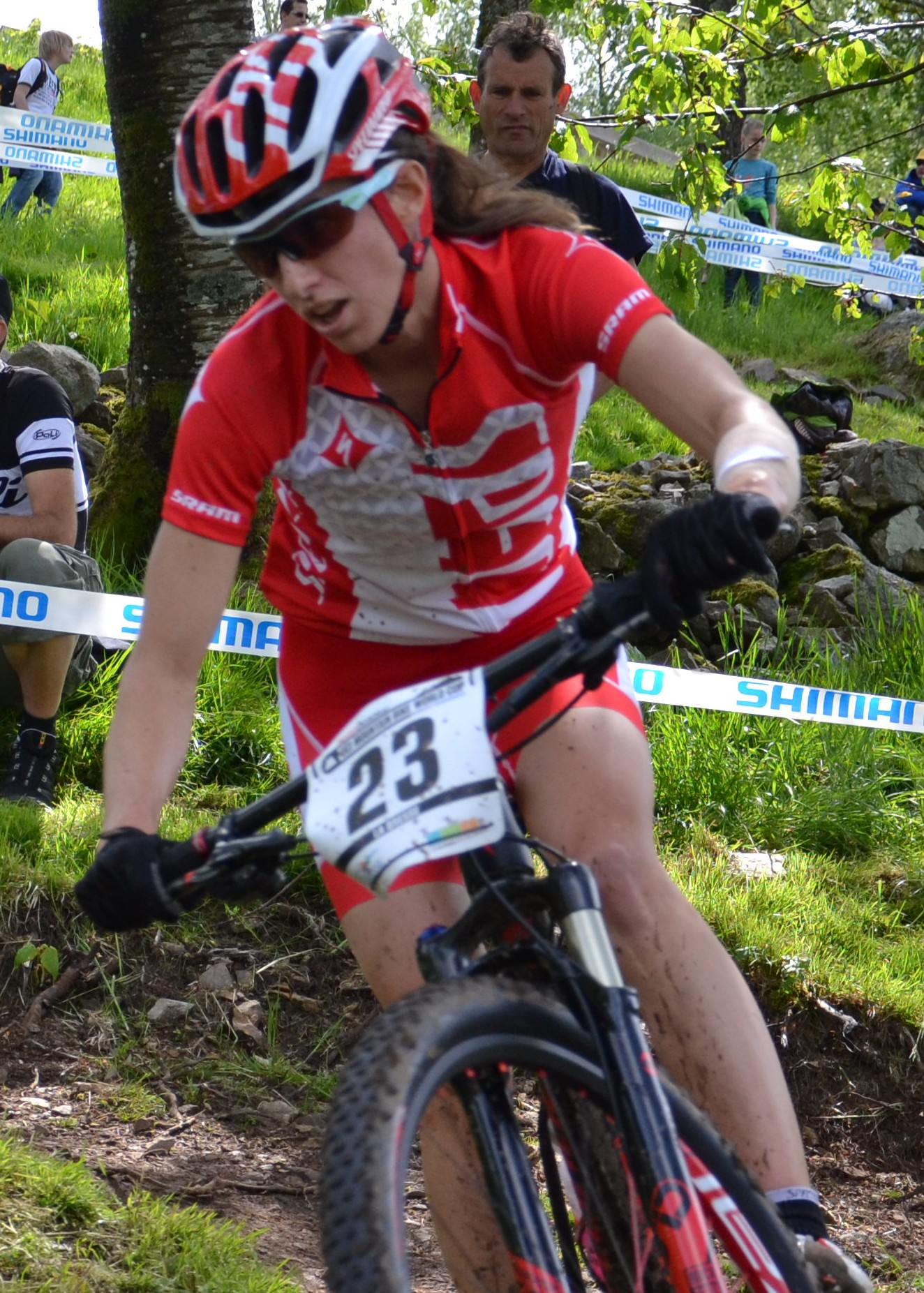 Lea Davison lors de la 4e manche de la coupe du monde de VTT 2012 à La Bresse (FRA).